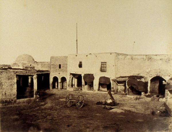 Ludovico Tuminello (1824-1907), Casa del Viceconsole francese sulla piazza del mercato di Menzel Gabes, Tunisia. Immagine eseguita nel 1875 per la Società Geografica Italiana.